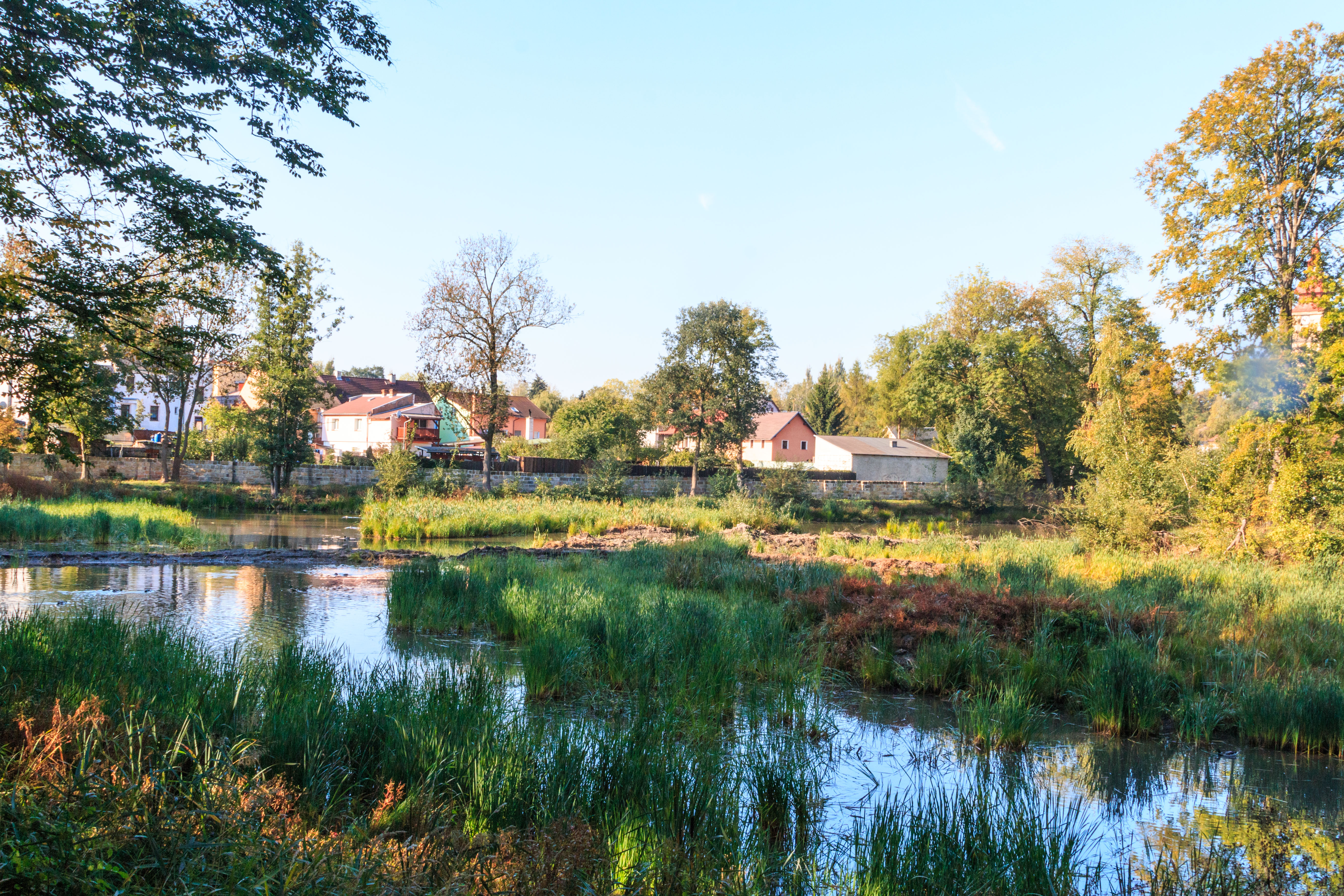 Zámecký rybník v Mimoni Project: Vodstvo.